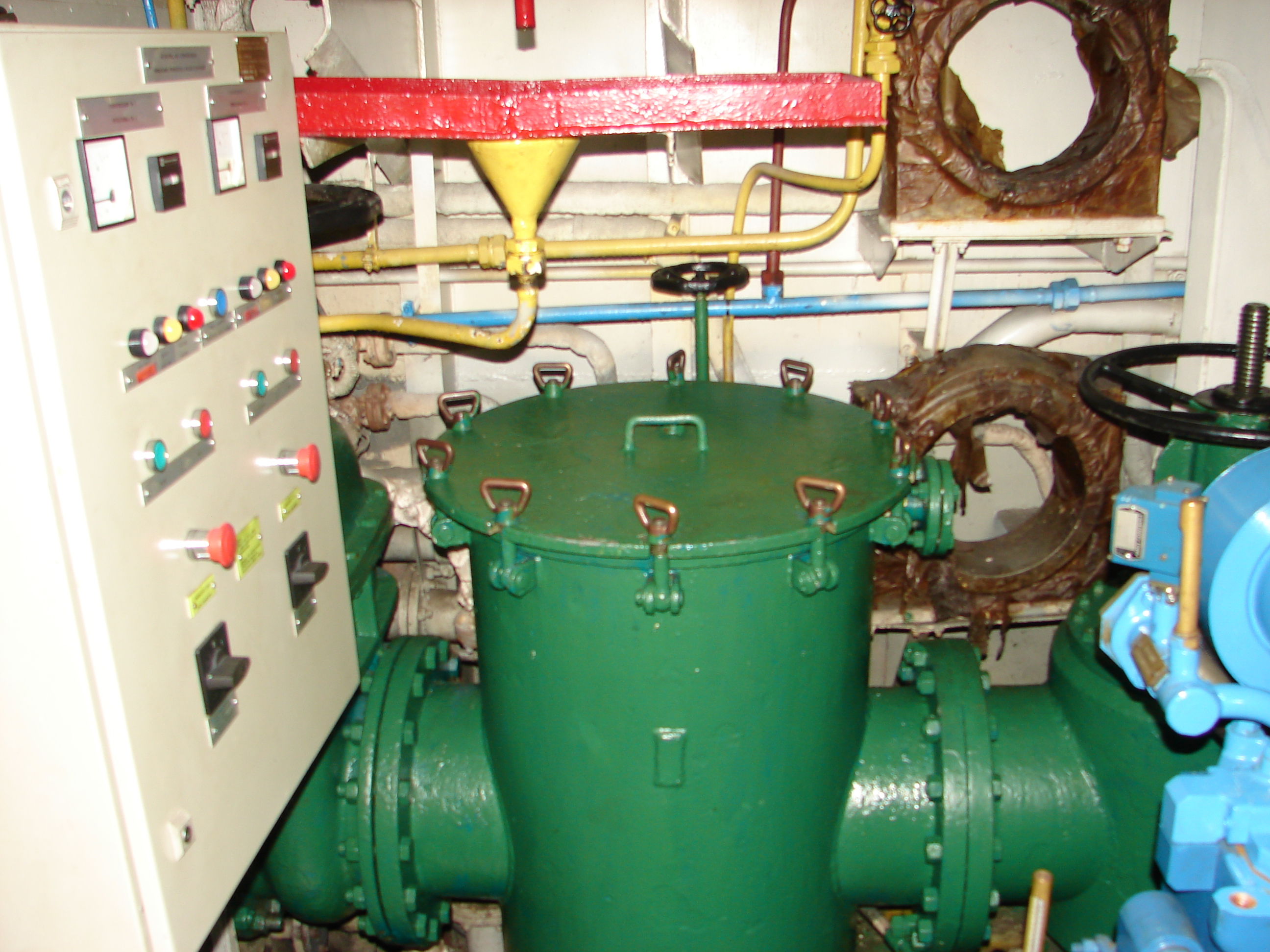 Skrzynia kingstonowa